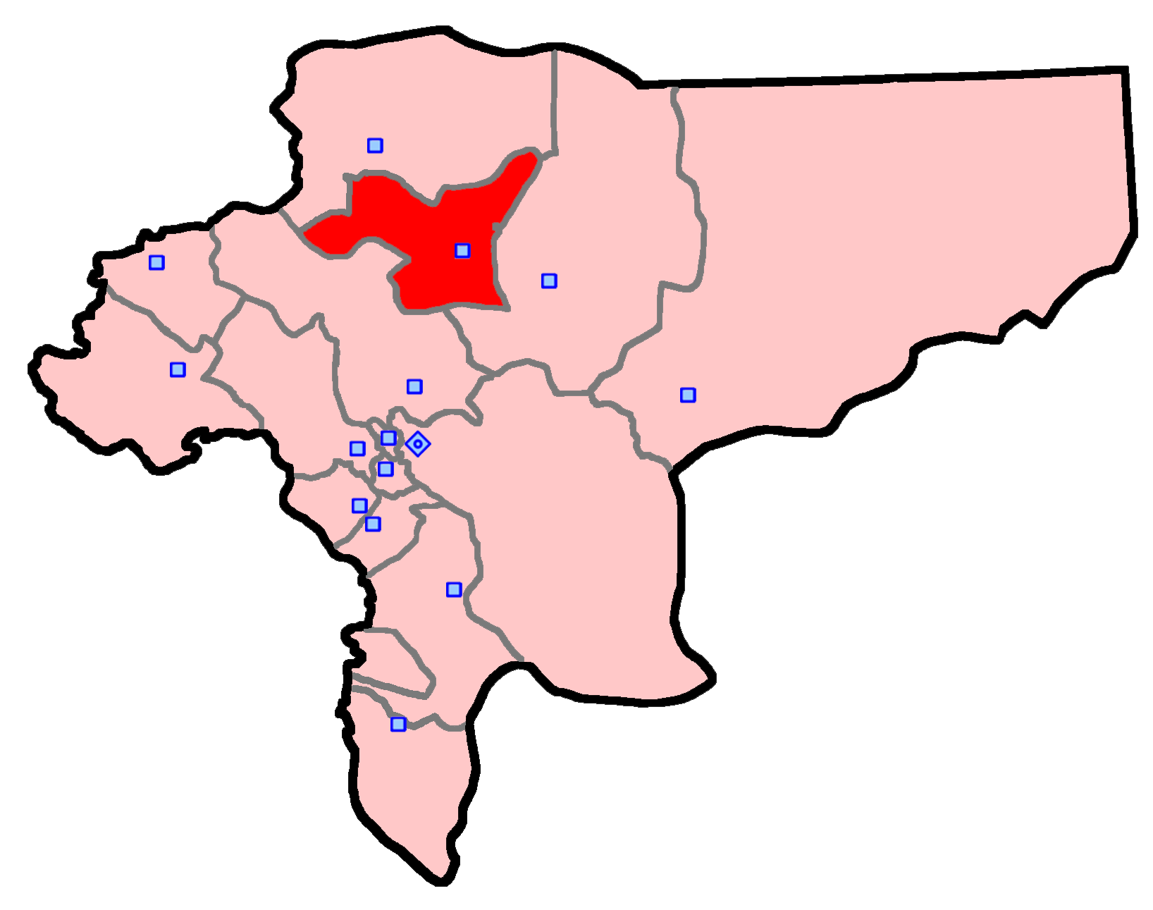 حوزهٔ انتخاباتی نطنز و قمصر برای انتخابات مجلس شورای اسلامی